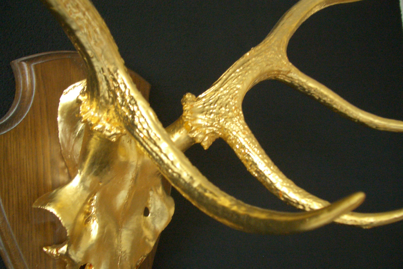 Een met bladgoud verguld hertengewei. Dit is door schitterend.eu met de mixtion methode verguld in 23,75 karaat bladgoud.